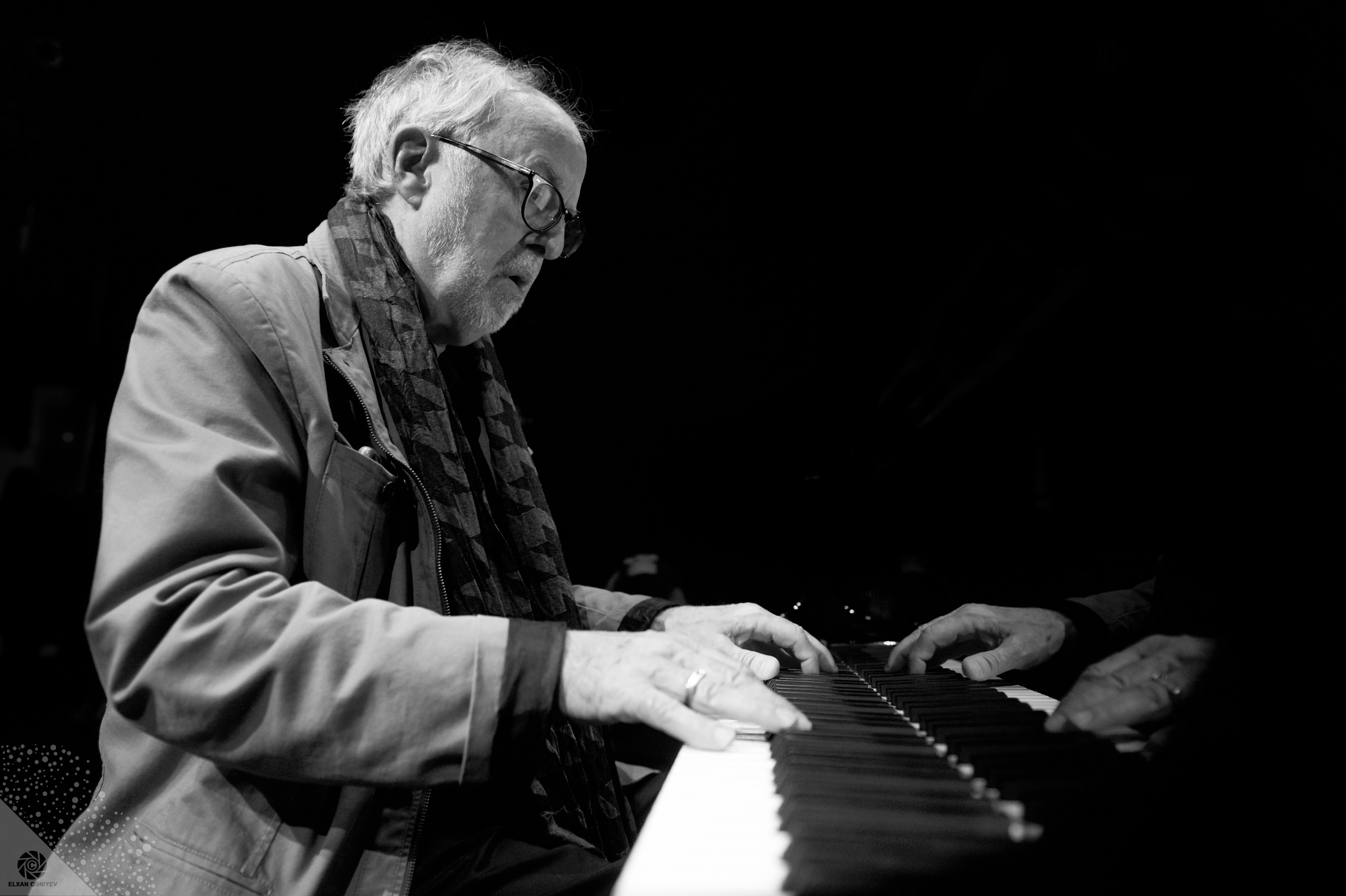 Bob James Jazzmen jazz music